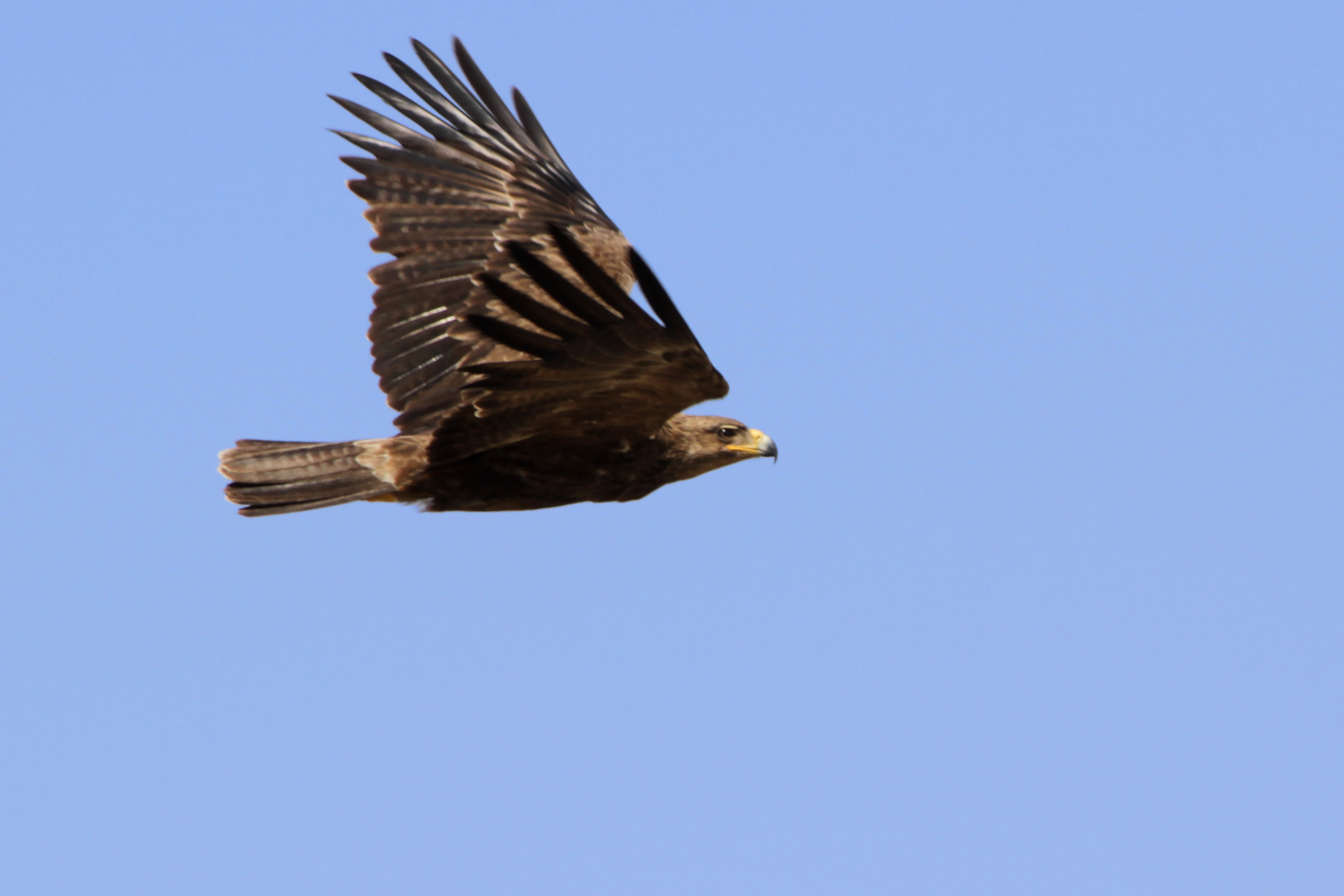 Aquila rapax (Tawny Eagle), Ol Pejeta Conservancy, Laikipia District, central Kenya